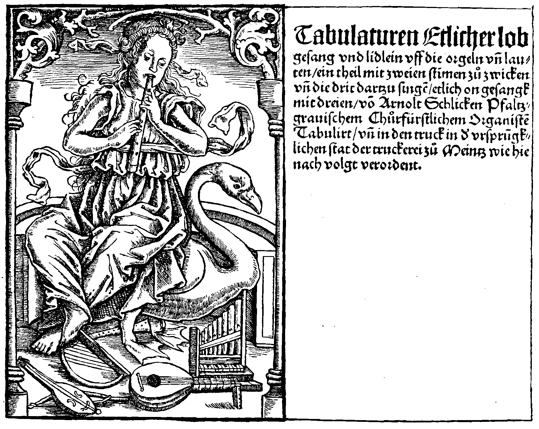 Title page of Arnolt Schlick's Tabulaturen etlicher lobgesang und lidlein uff die orgeln un lauten (Mainz, 1512) (PNG version)